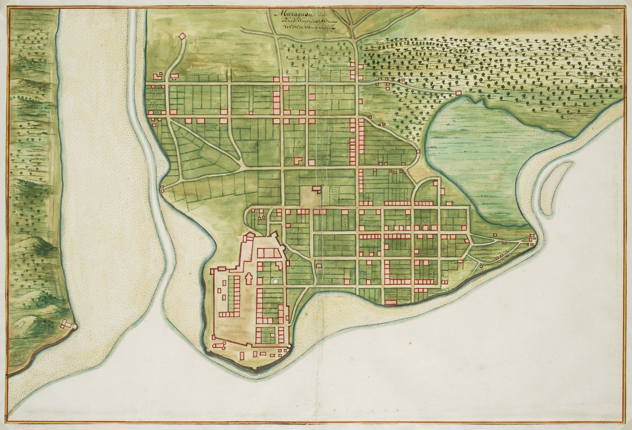 Maragnon in Zuid America ten westen van Brasill